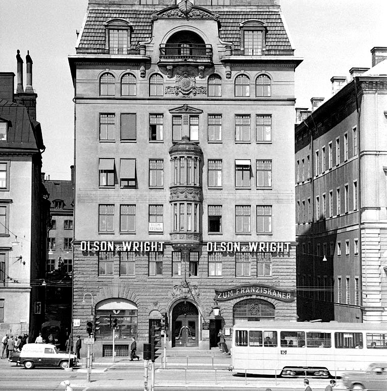 Kvarteret NARCISSUS. Skeppsbron 44. Gamla Stan.